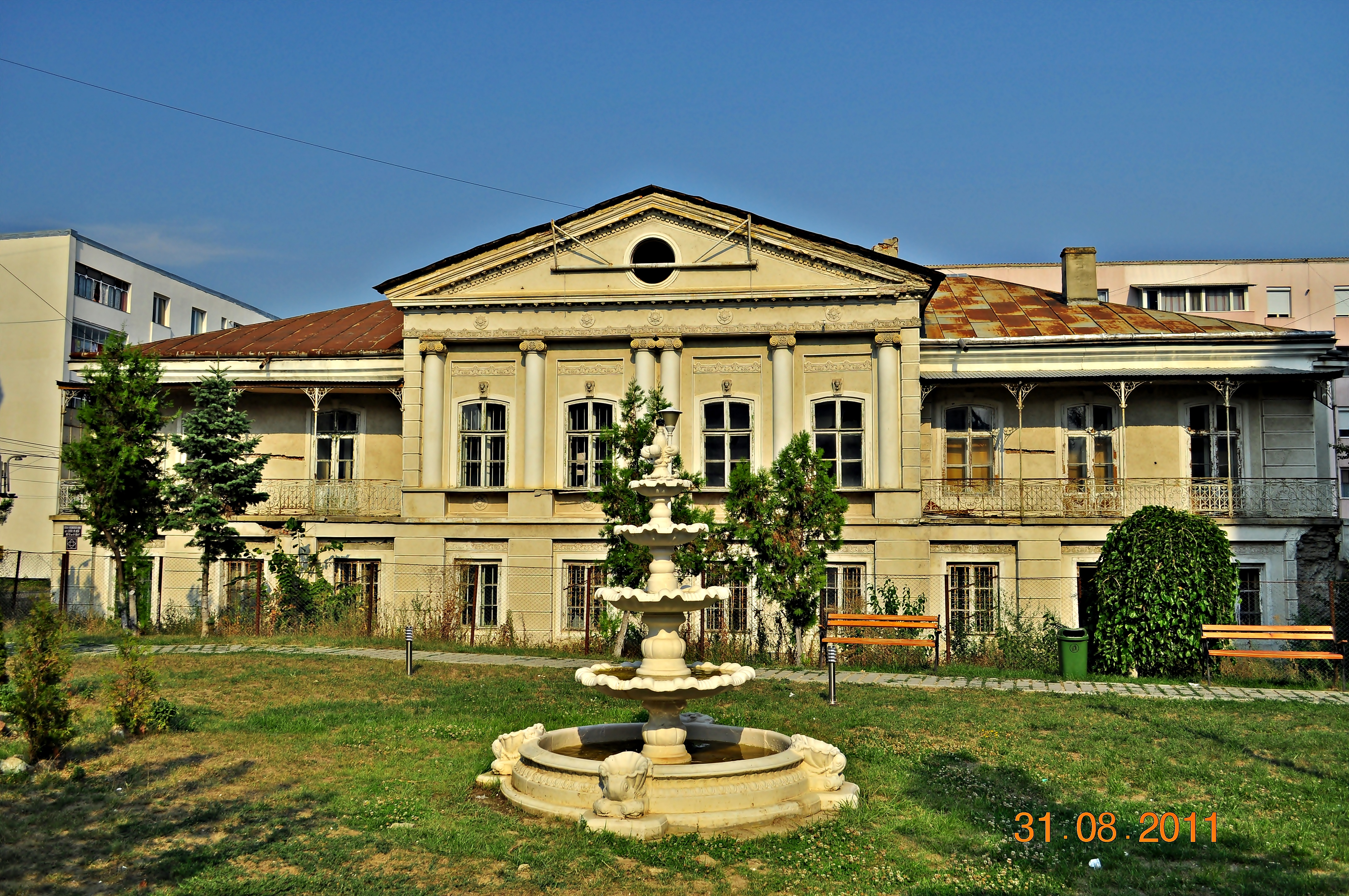 Casa vornicului Done (Casa Celibidache) din Roman,Neamt,Romania. Cod LMI:NT-II-m-B-10649 Adresa:Str. Veronica Micle 2 Datare:1828 situata in centrul municipiului Roman; dateaza de la sfarsitul secolului al XVIII-lea, fiind cumparata in 1825 de vornicul Grigore Done; este o constructie cu o arhitectura oarecum inedita, ce diferentiaza subsolul cu doua beciuri etajate si parterul cu bolti semicilindrice, de nivelul superior, conceput si realizat in stil clasic, cu fronton si coloane angajate la exterior si bogate decoratiuni de factura baroca in interior; cunoscuta si dub numele de Casa Celibidache, deoarece aici s-a nascut, in 1912, Sergiu Celibidache, considerat ca fiind unul din cei mai valorosi dirijori ai tuturor timpurilor, care a dirijat Orchestra Filarmonicii din Munchen intre 1979 si 1996; monument istoric.